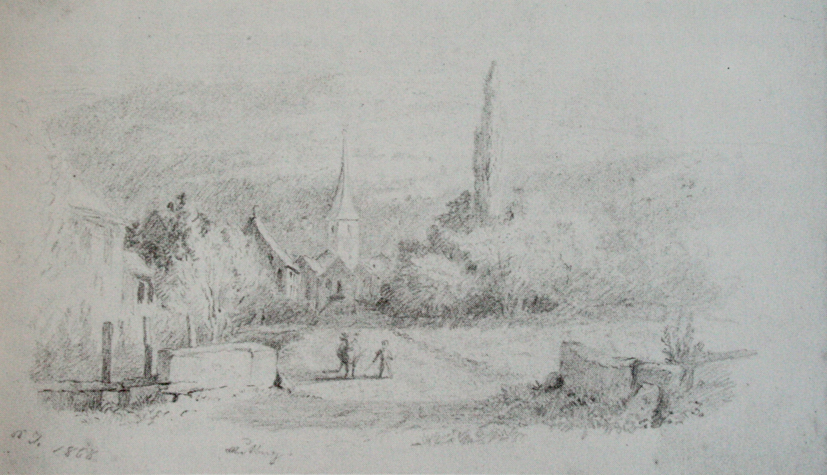 Ansicht von Muttenz aus dem Skizzenbuch von 1868, von Karl Jauslin, Chromolithografie, Bleistift, 10.5x17 cm